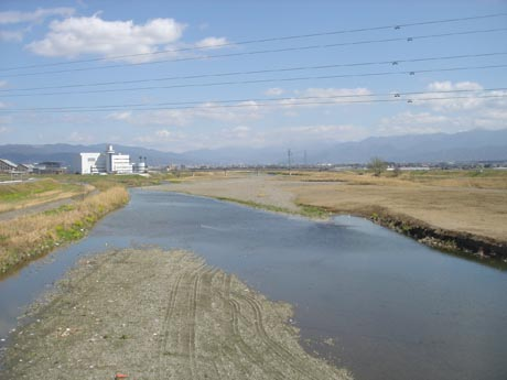 2007.3.6 投稿者が撮影